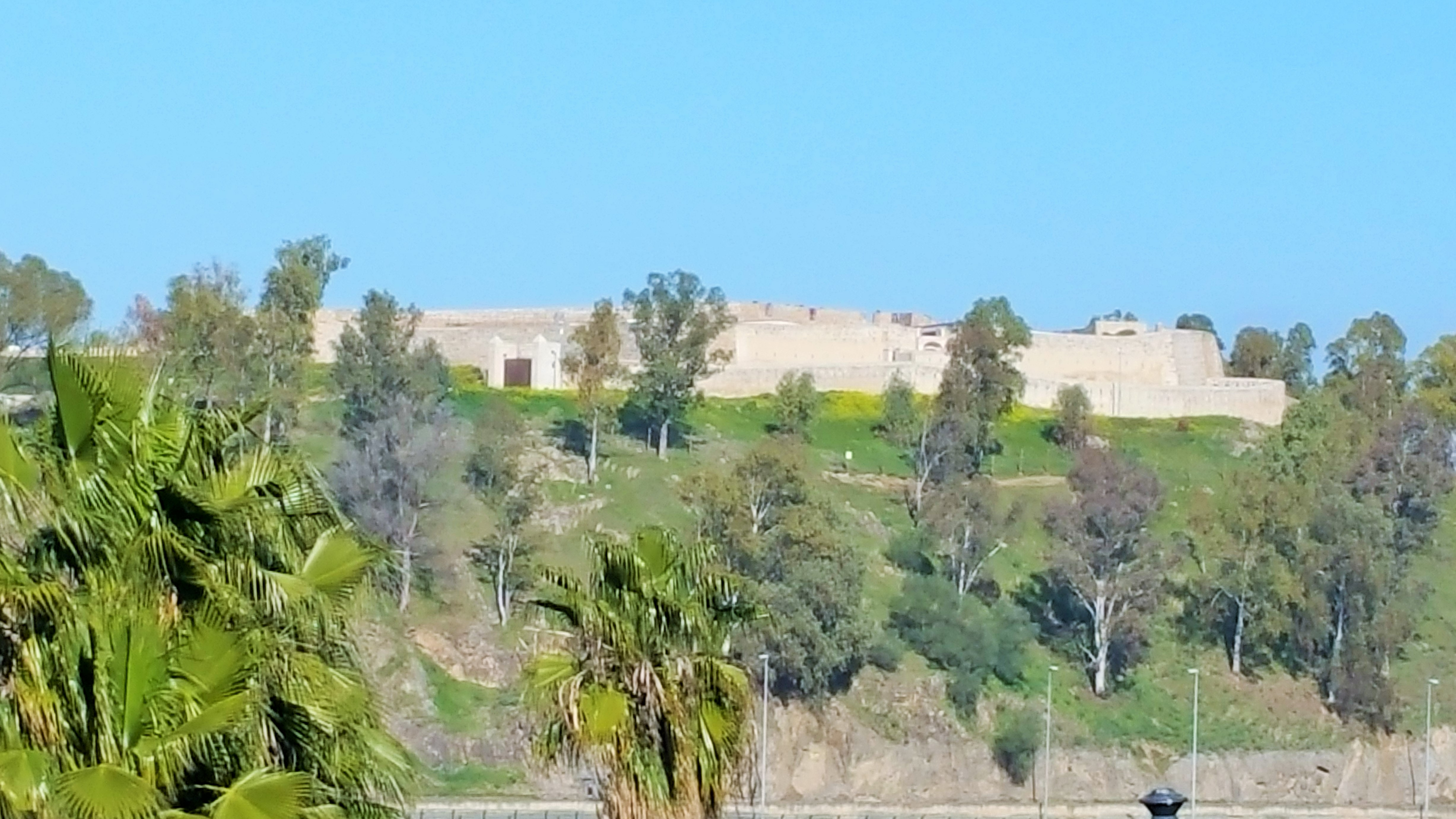 Fuerte de S. Cristobal desde la Alcazaba